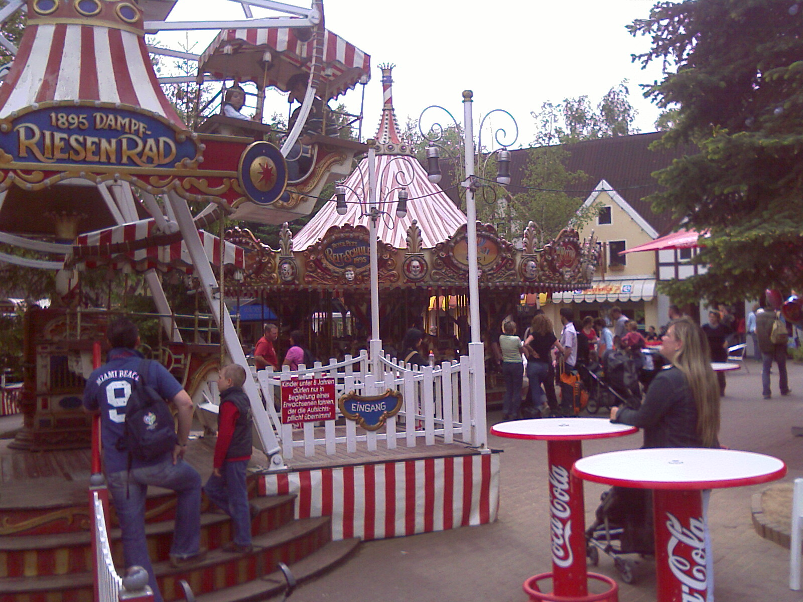 Rastiland Historischer Jahrmarkt